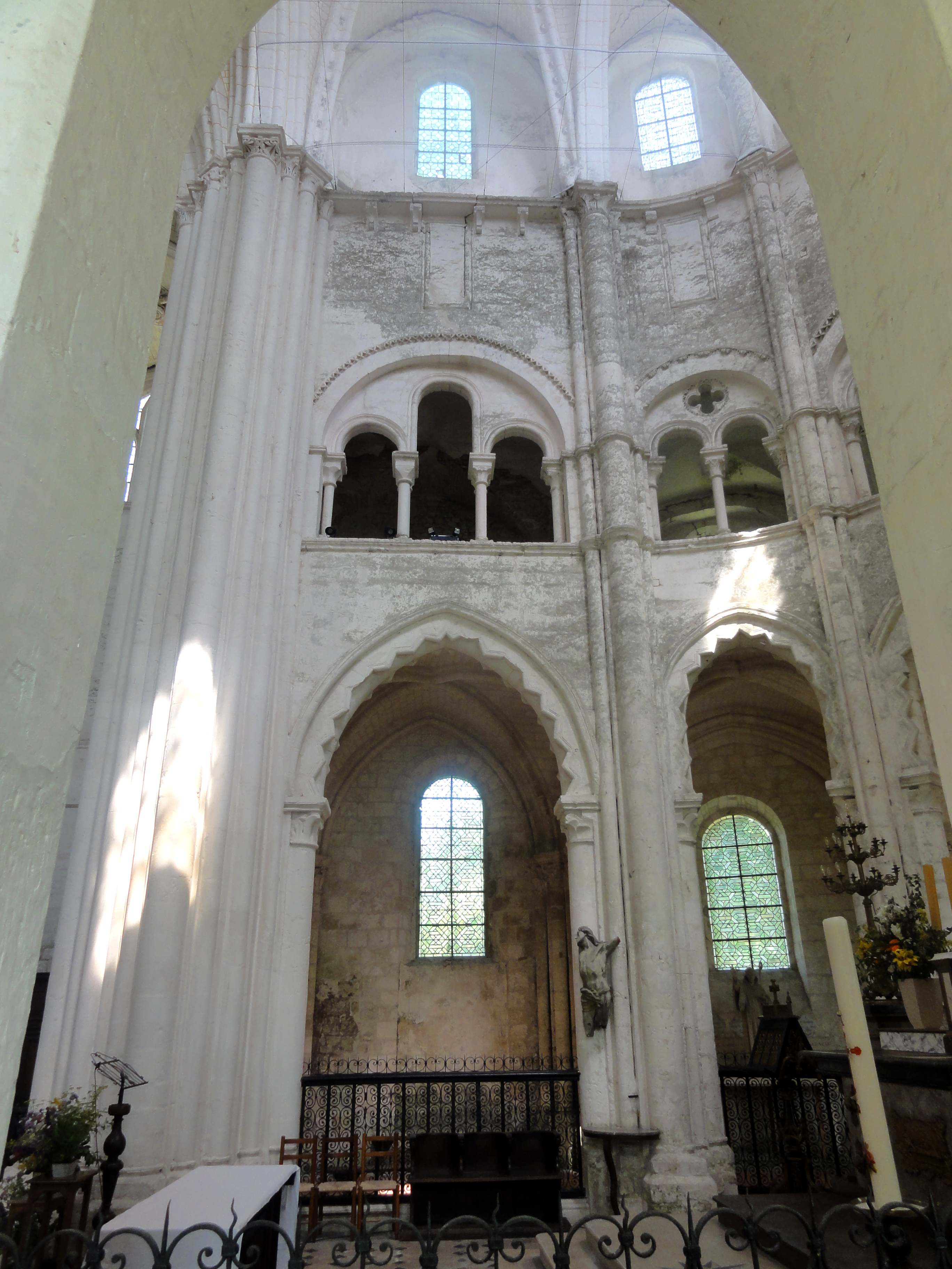 Chœur de l'abbatiale - voir le titre du fichier.